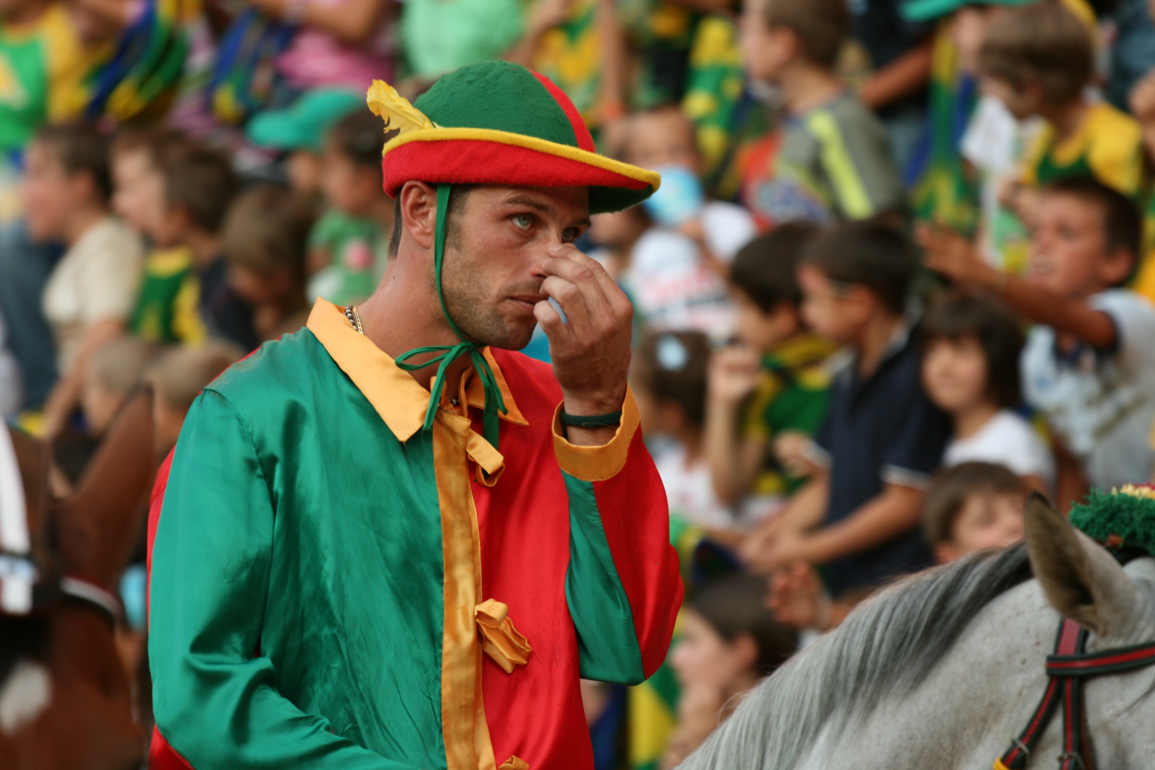 Antonio Villella detto Sgaibarre (Drago's jockey)